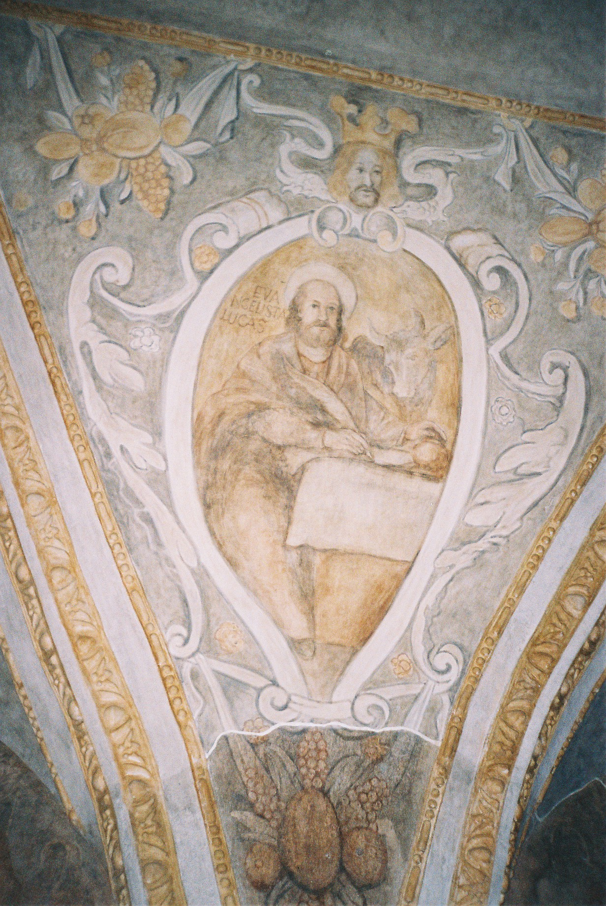 kamienica Gruszewiczów - wnętrze 7